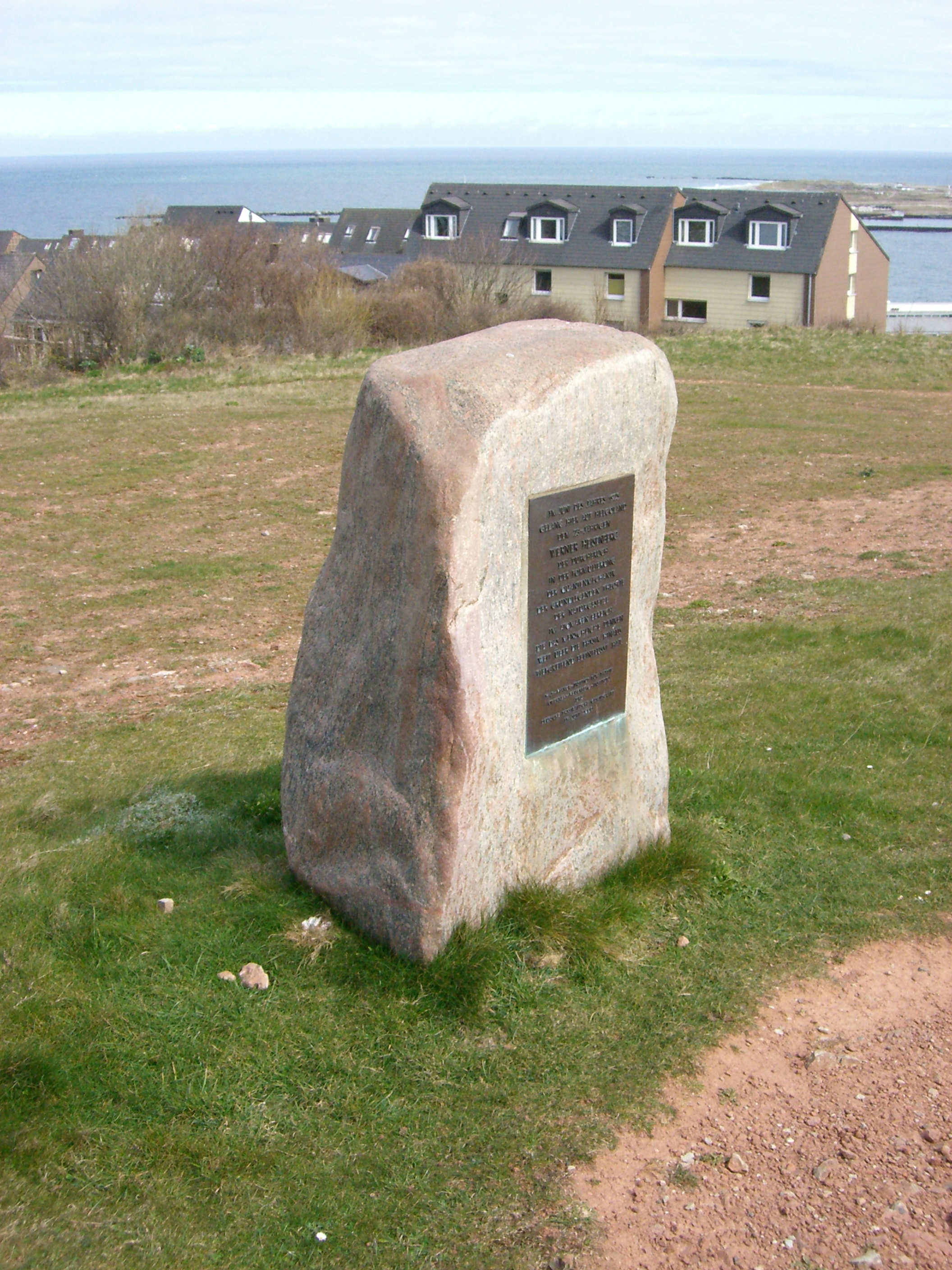 Helgoland, der Gedenkstein für Werner Heisenberg auf dem Oberland wurde am 16. Juni 2000 enthüllt. Text: "IM JUNI DES JAHRES 1925 / GELANG HIER AUF HELGOLAND / DEM 23-JÄHRIGEN / WERNER HEISENBERG / DER DURCHBRUCH / IN DER FORMULIERUNG / DER QUANTENMECHANIK, / DER GRUNDLEGENDEN THEORIE / DER NATURGESETZE / IM ATOMAREN BEREICH, / DIE DAS MENSCHLICHE DENKEN / WEIT ÜBER DIE PHYSIK HINAUS / TIEFGREIFEND BEEINFLUSST HAT. // MAX-PLANCK-INSTITUT FÜR PHYSIK / (WERNER-HEISENBERG-INSTITUT) / UND / DEUTSCHE PHYSIKALISCHE GESELLSCHAFT / IM JUNI 2000"